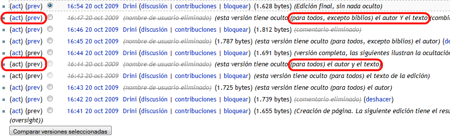 Captura de pantalla que ilustra los niveles de oversight.